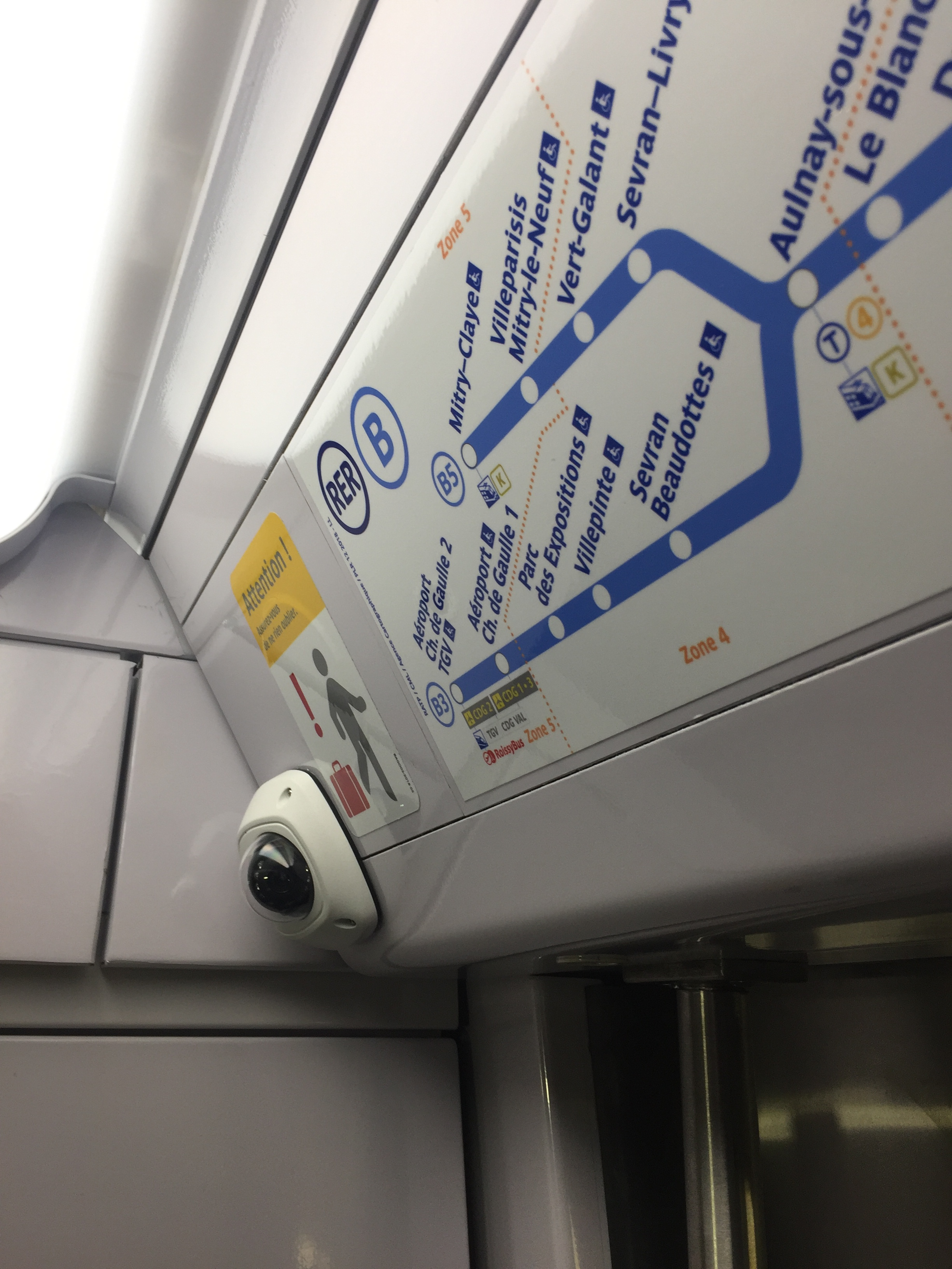 Rénovation des trains MI 84 en cours dans les ateliers Alstom de Reichshoffen (Alsace). Plan de ligne et caméra.